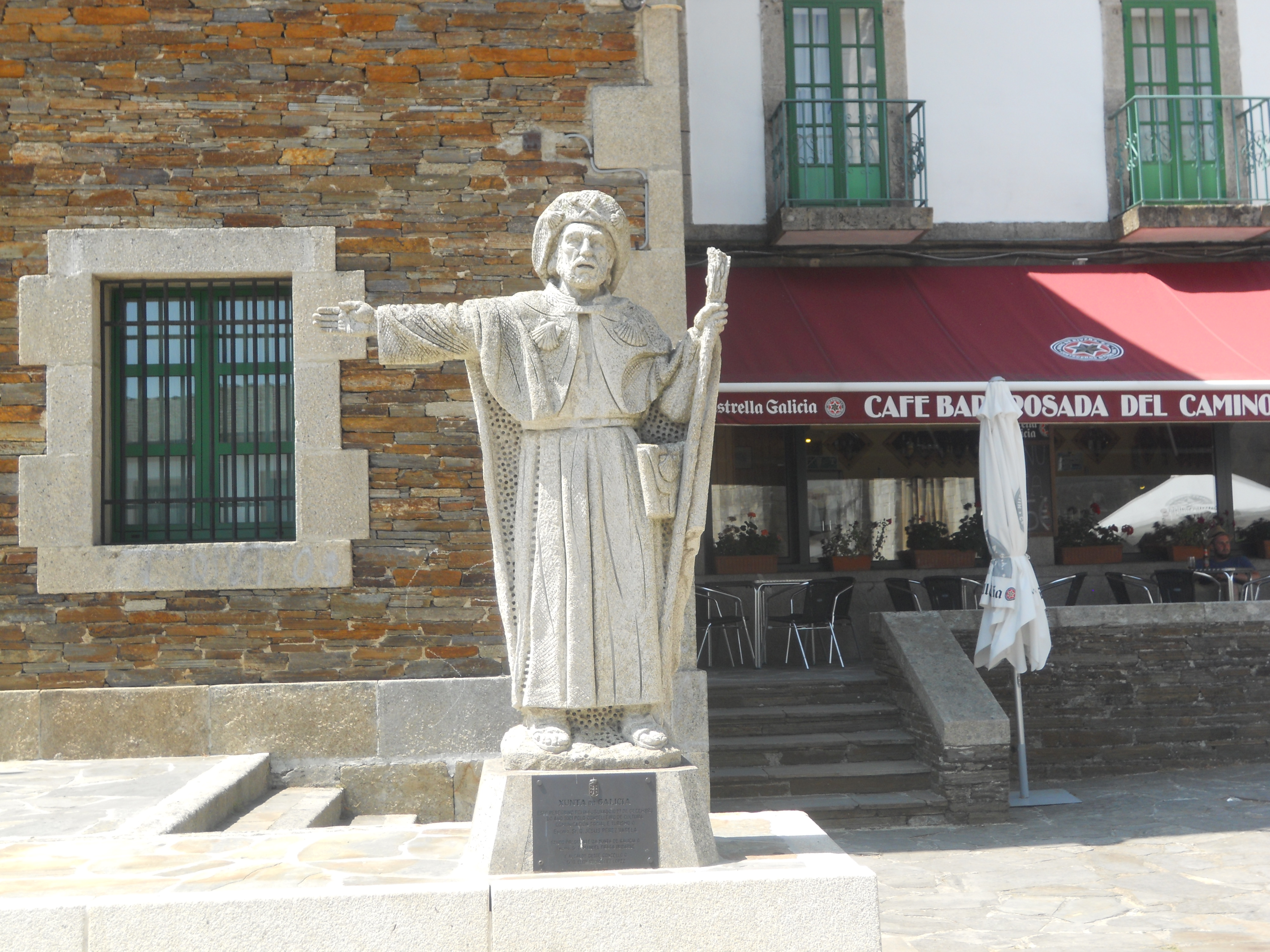 Socha sv. Jakuba, která dokládá přítomnost Svatojakubské cesty ve městě Portomarín, Galicie, Španělsko